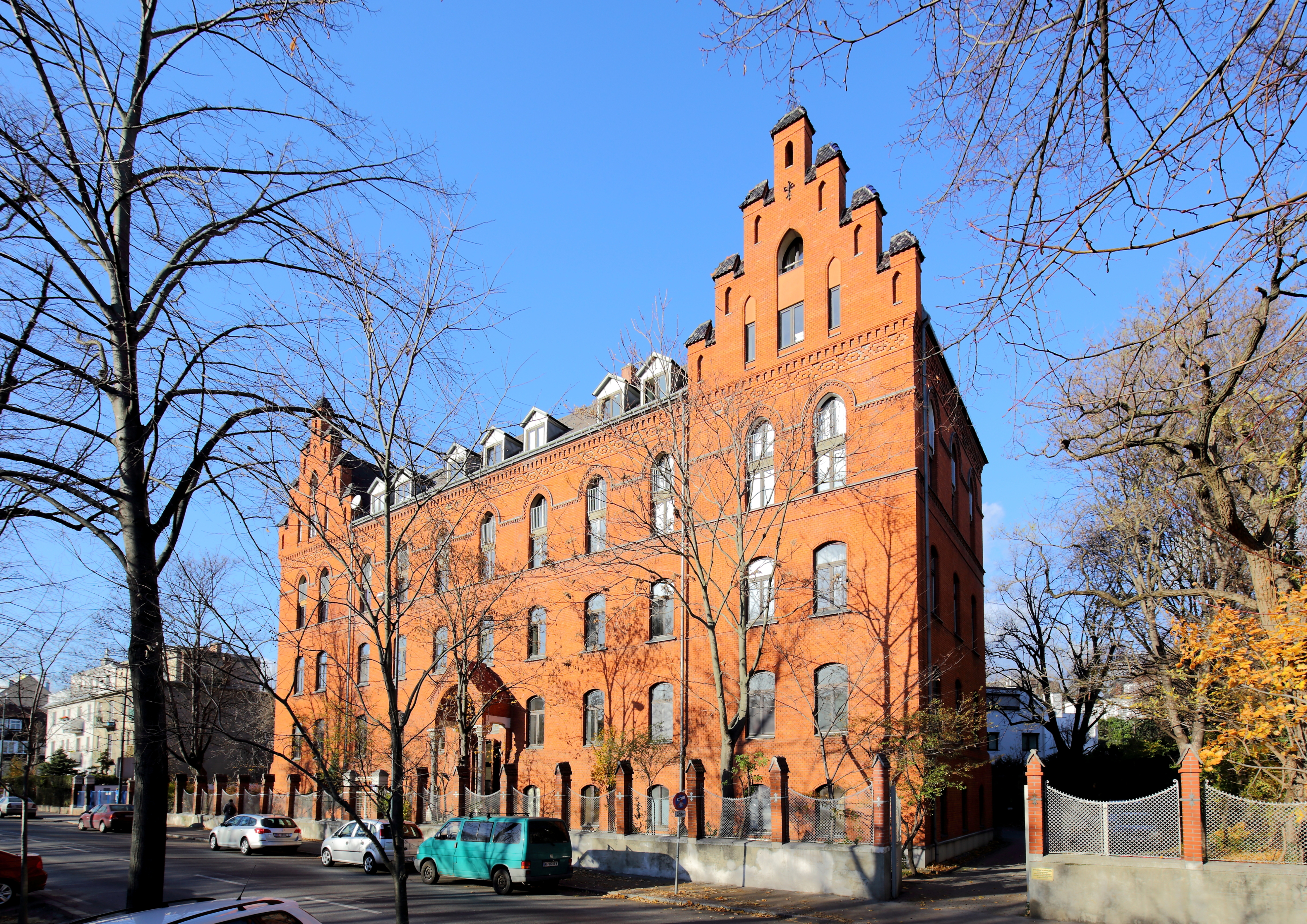 Ehemaliges israelitisches Mädchenwaisenhaus an der Adresse Ruthgasse 21 im 19. Wiener Gemeindebezirk Döbling.Das Waisenhaus wurde von den Großindustriellen David von Gutmann und Wilhelm von Gutmann gestiftet und von dem Architekten Max Fleischer von 1889 bis 1891 errichtet.